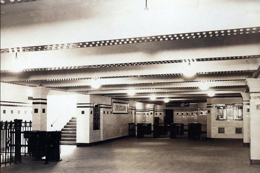 Entrepiso y boletería de la estación Uruguay de la actual línea B del subte de Buenos Aires.